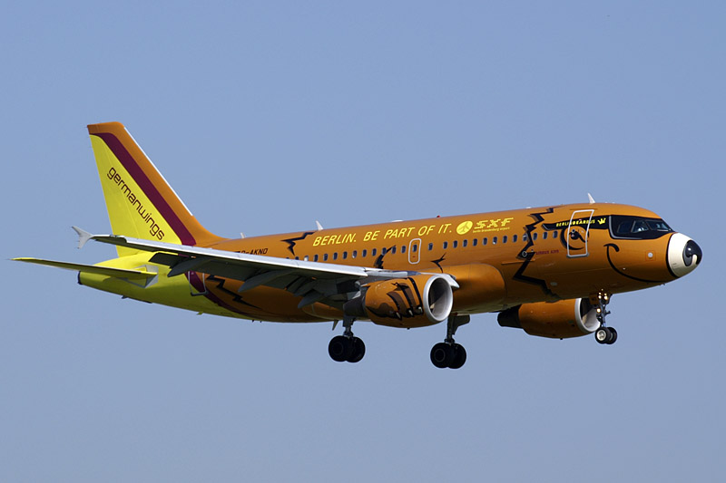 Germanwings "Berlinbearbus" Airbus A319, D-AKNO